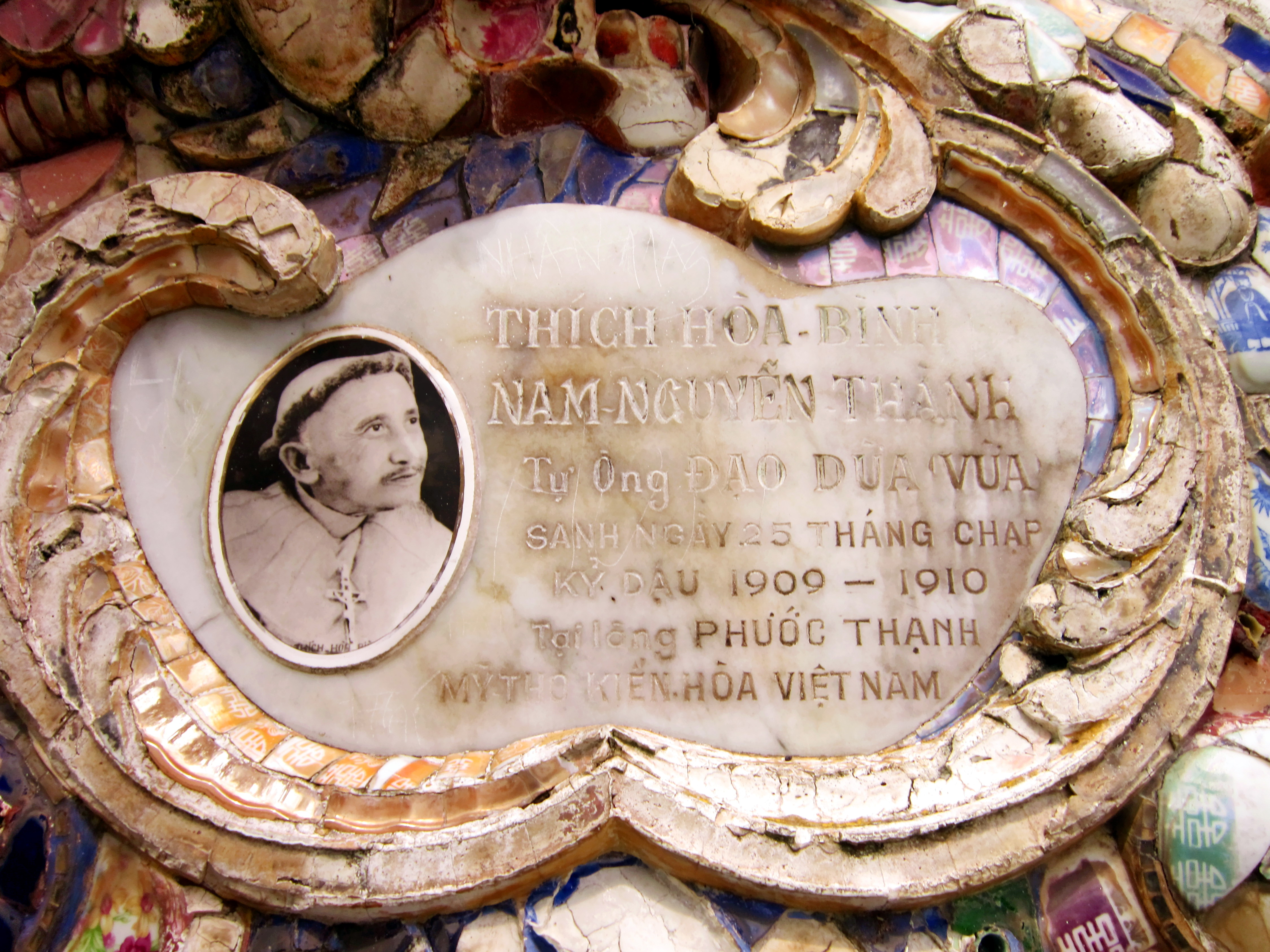 Tấm đá cẩm thạch có ghi vắn tắt tên tuổi ông Đạo Dừa (Nguyễn Thành Nam, 1909-1990). Bia được gắn trên đỉnh lớn ở nơi hành đạo của ông (cồn Phụng, Bến Tre, Việt Nam).